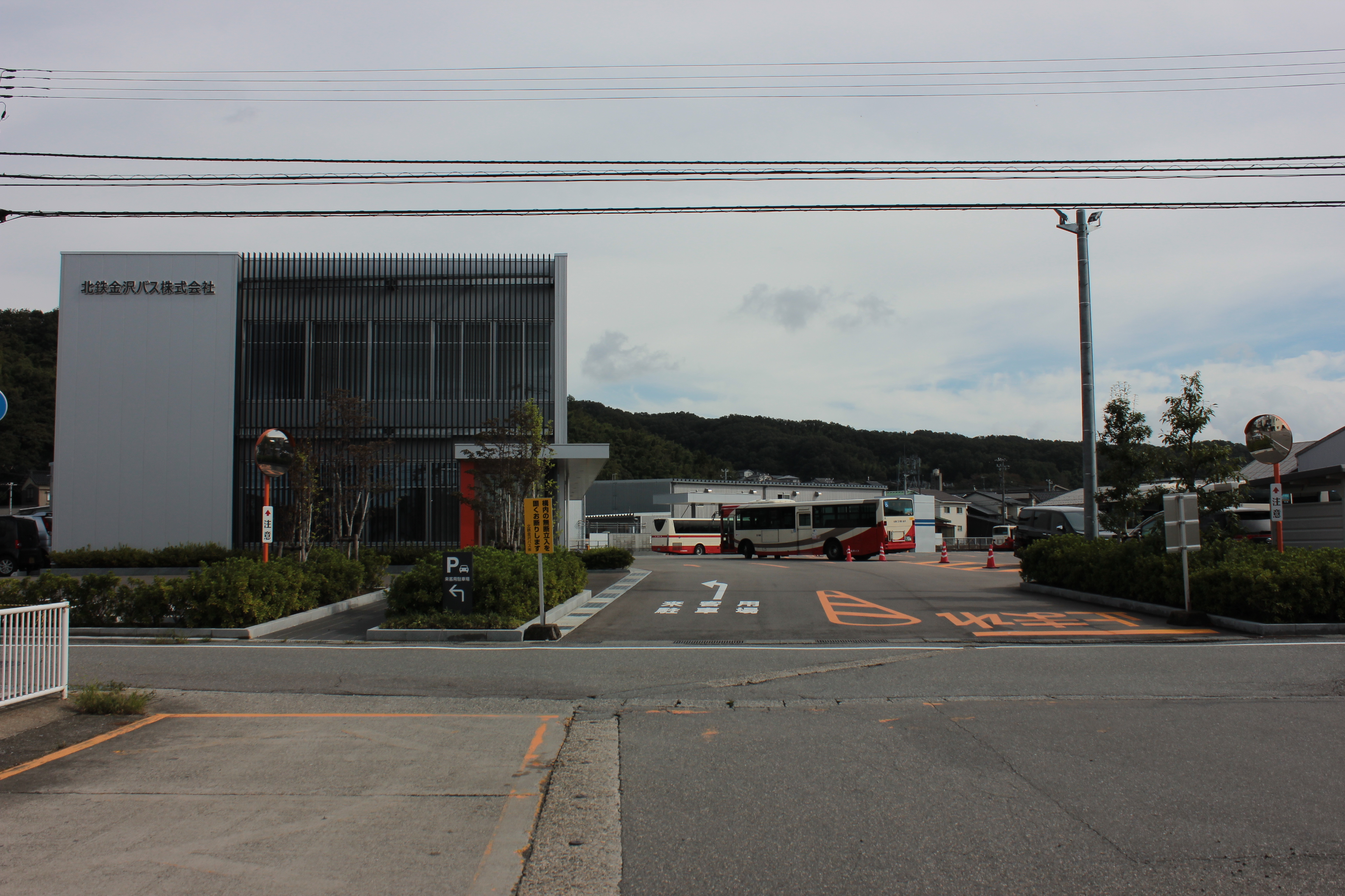 北鉄金沢バス北部営業所（石川県金沢市） Canon EOS Kiss X5